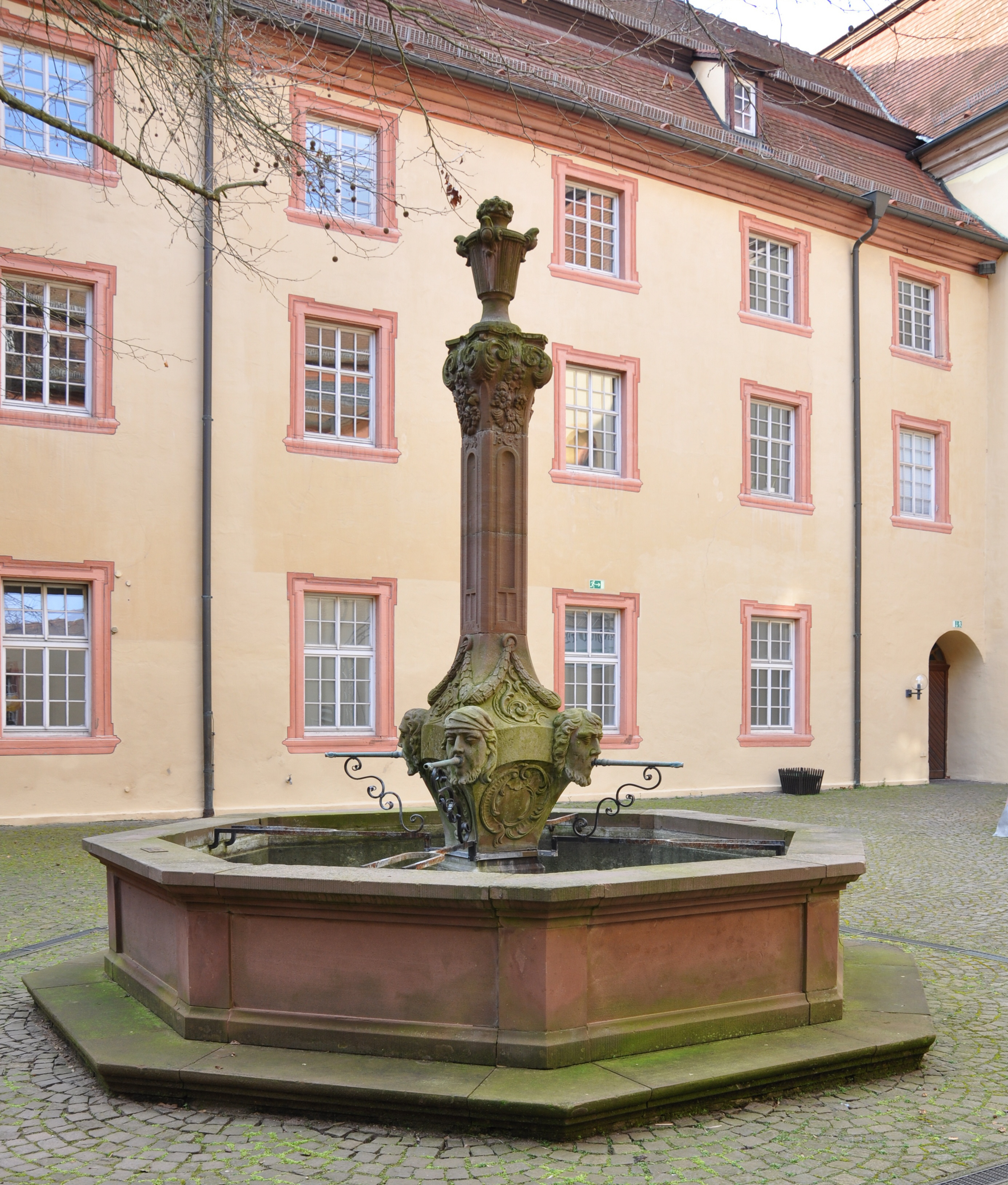 Oberndorf am Neckar, ehemaliges Augustinerkloster (jetzt Rathaus), Brunnen im Innenhof